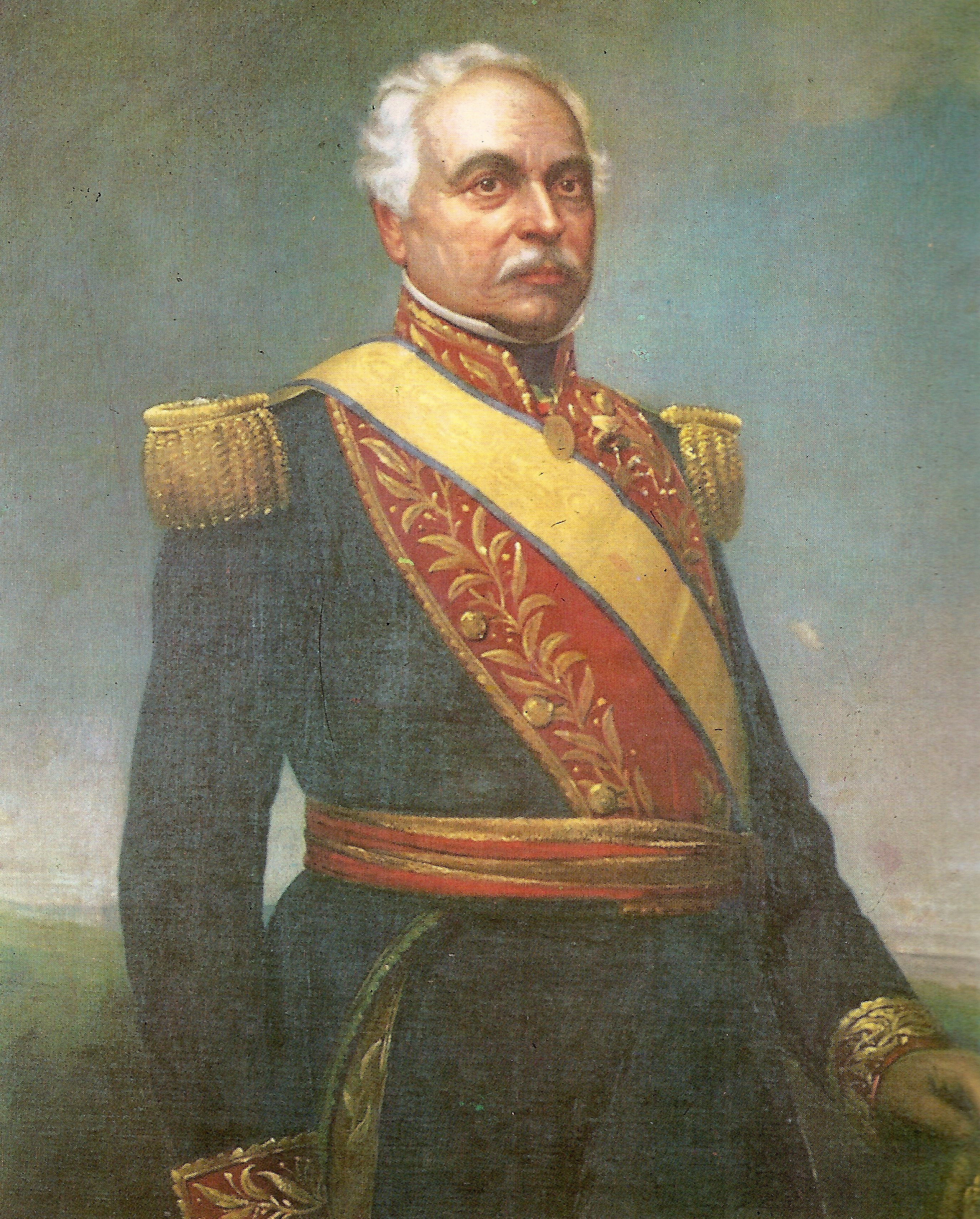 José Antonio Páez painting.